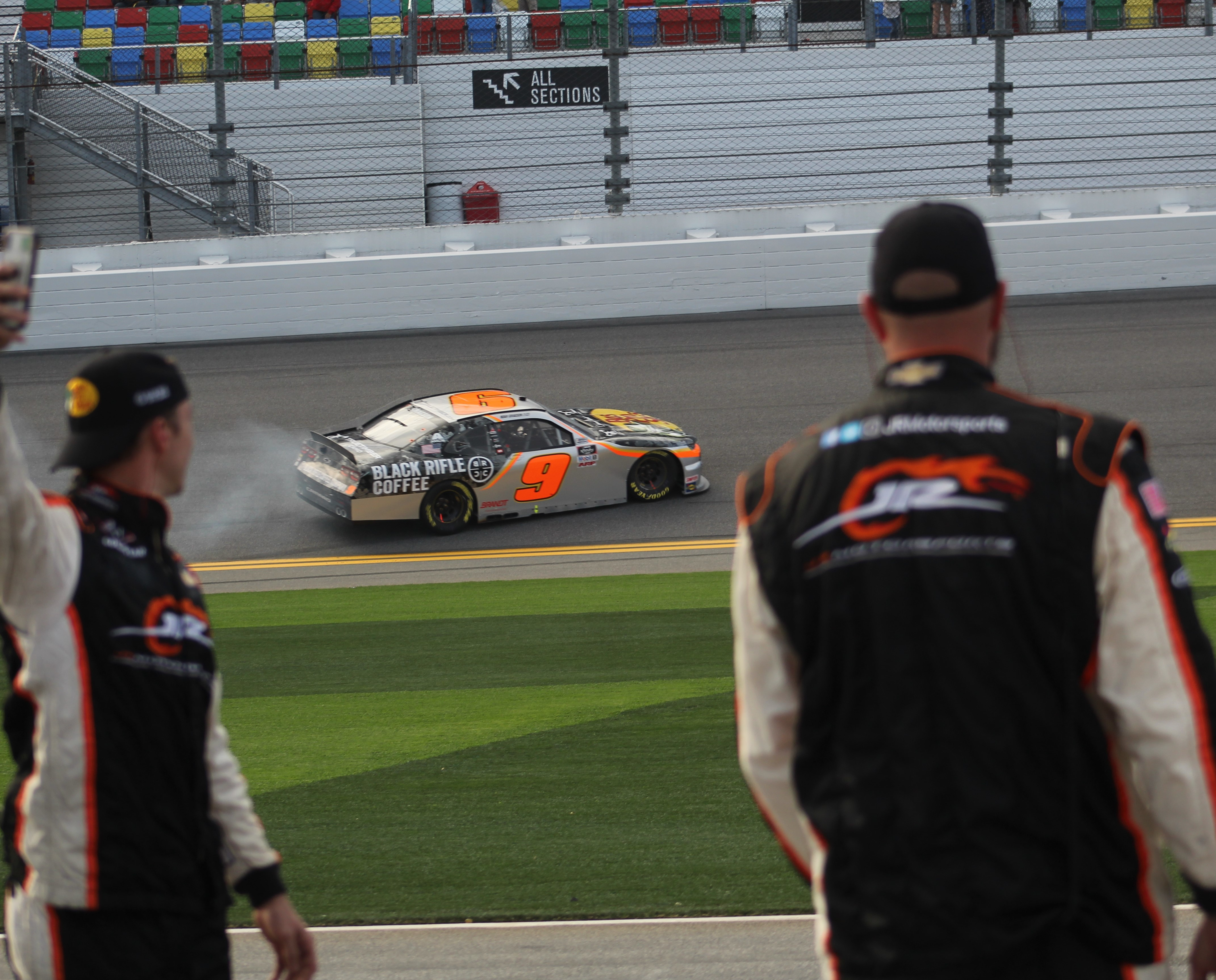 Daytona Speekweeks, 2020